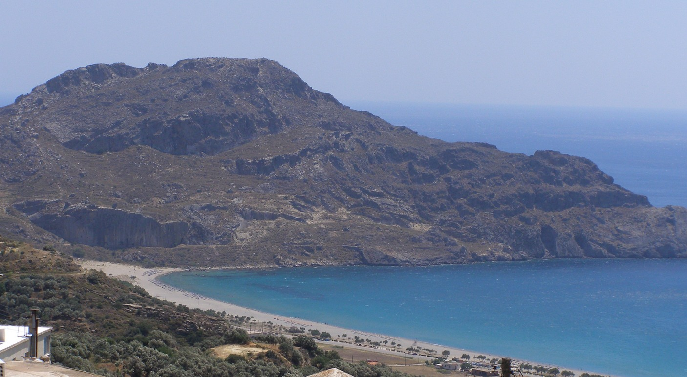 Halbinsel "Kakomouri" bei Plakias, Kreta